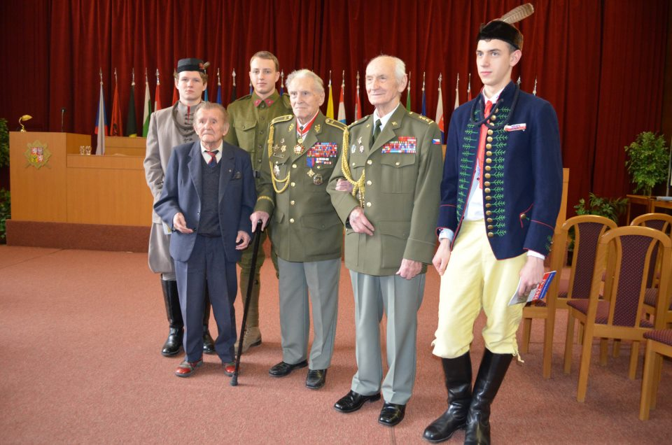 Váleční veteráni (a) Sokolové. Zleva:L.Křemen , L.Vojtěchovský, M.Manda, A.Beer, (neznámý plukovník), F.Jandus na setkání v sále Ministerstva obrany na Valech v srpnu 2012 při výročí Slovenského nár.povstání.